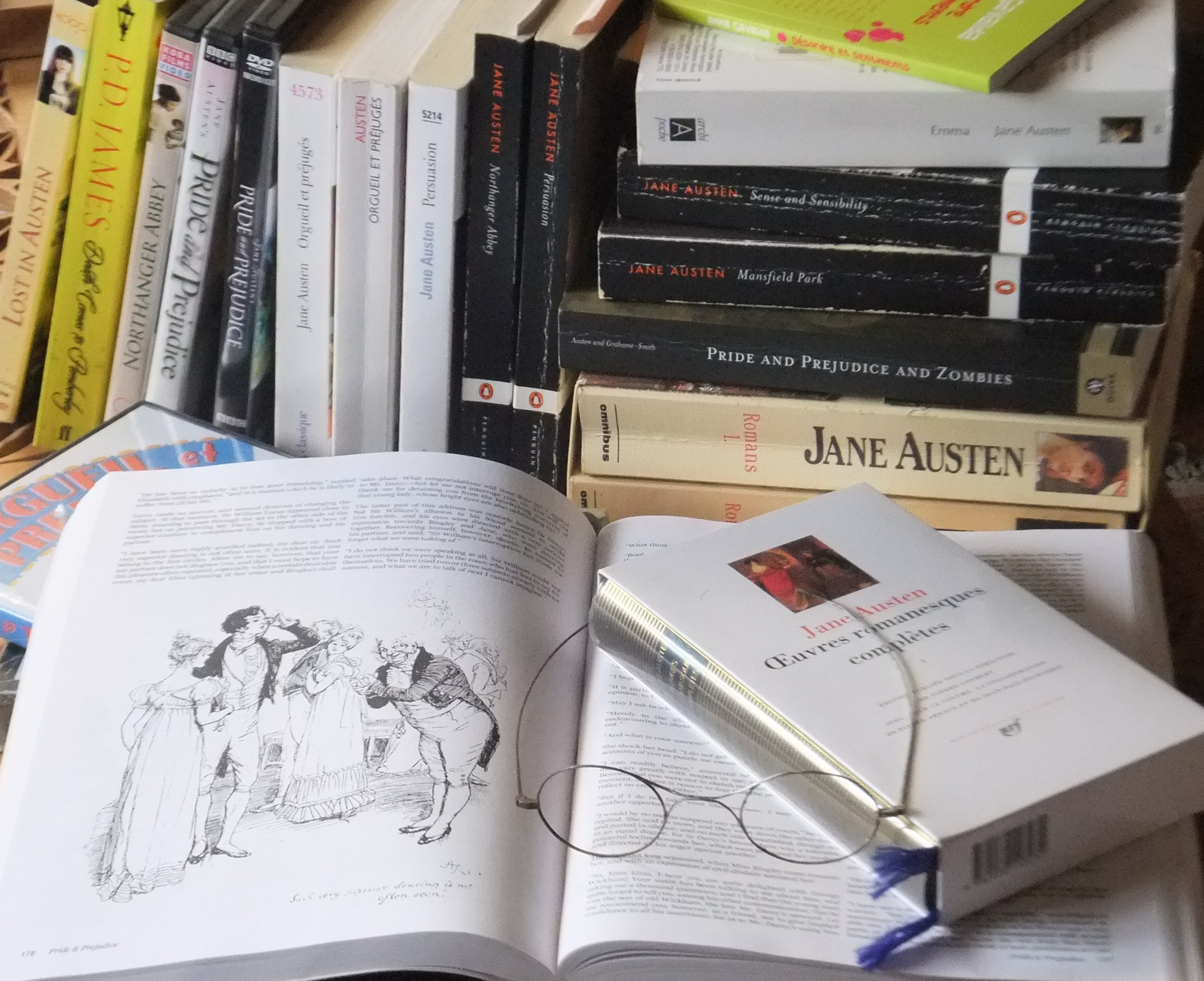 Mini-bibliothèque des romans de Jane Austen, avec quelques traductions en français, adaptations et oeuvres dérivées.